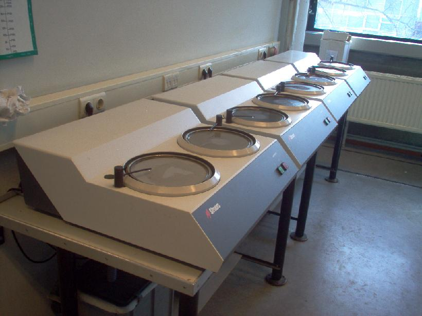 Zelfgemaakte foto vanochtend, voor in het artikel schuren (techniek). Je ziet hier trouwens een schuurstraat.